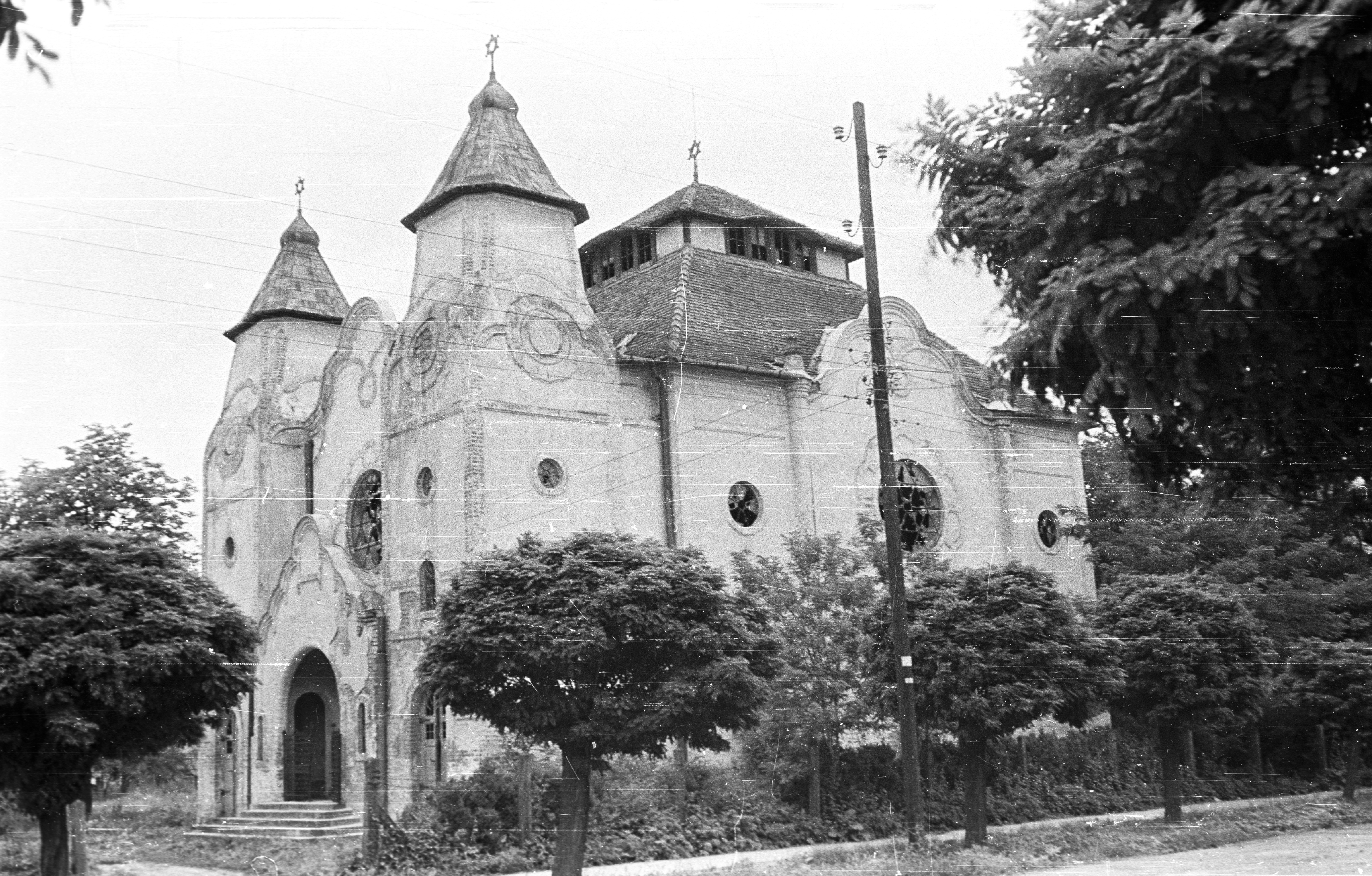 Zsinagóga. Location: Hungary Tags: synagogue Title: Zsinagóga.